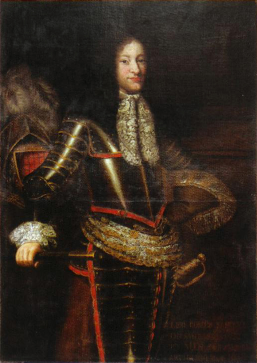 Беларуская (тарашкевіца): Партрэт Лявона Базыля Сапегі (Lavon Bazyl Sapieha) гербу «Ліс» (1652—1686), дзяржаўнага і вайсковага дзеяча Вялікага Княства Літоўскага, стольніка вялікага літоўскага, падскарбія надворнага літоўскага, генэрала артылерыі літоўскай